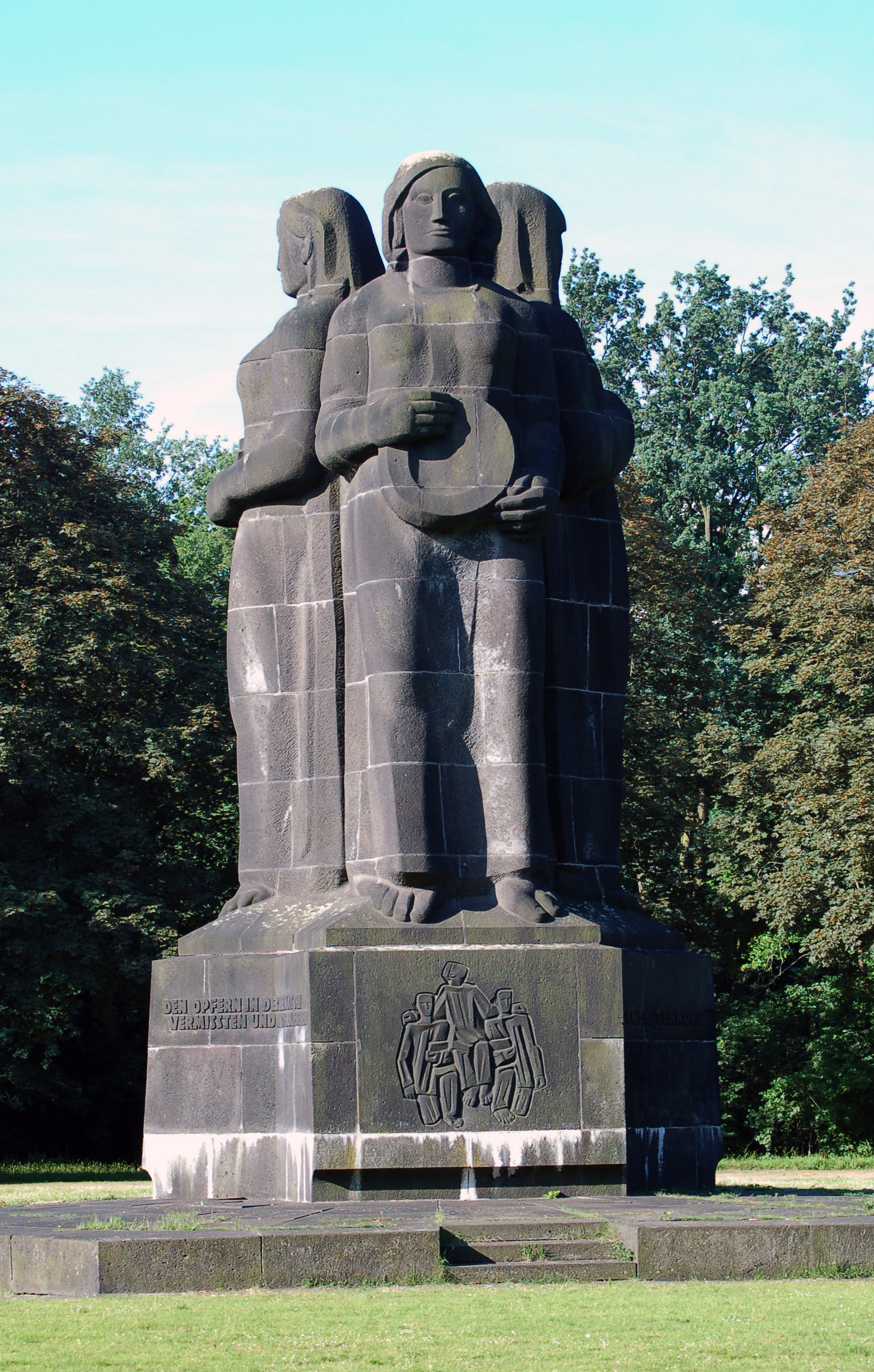 Mahnmal am Nordfriedhof Düsseldorf, 1958 errichtet nach einem Entwurf von Jupp Rübsam, Höhe der Figuren 7,5 m, Gesamthöhe 10 m